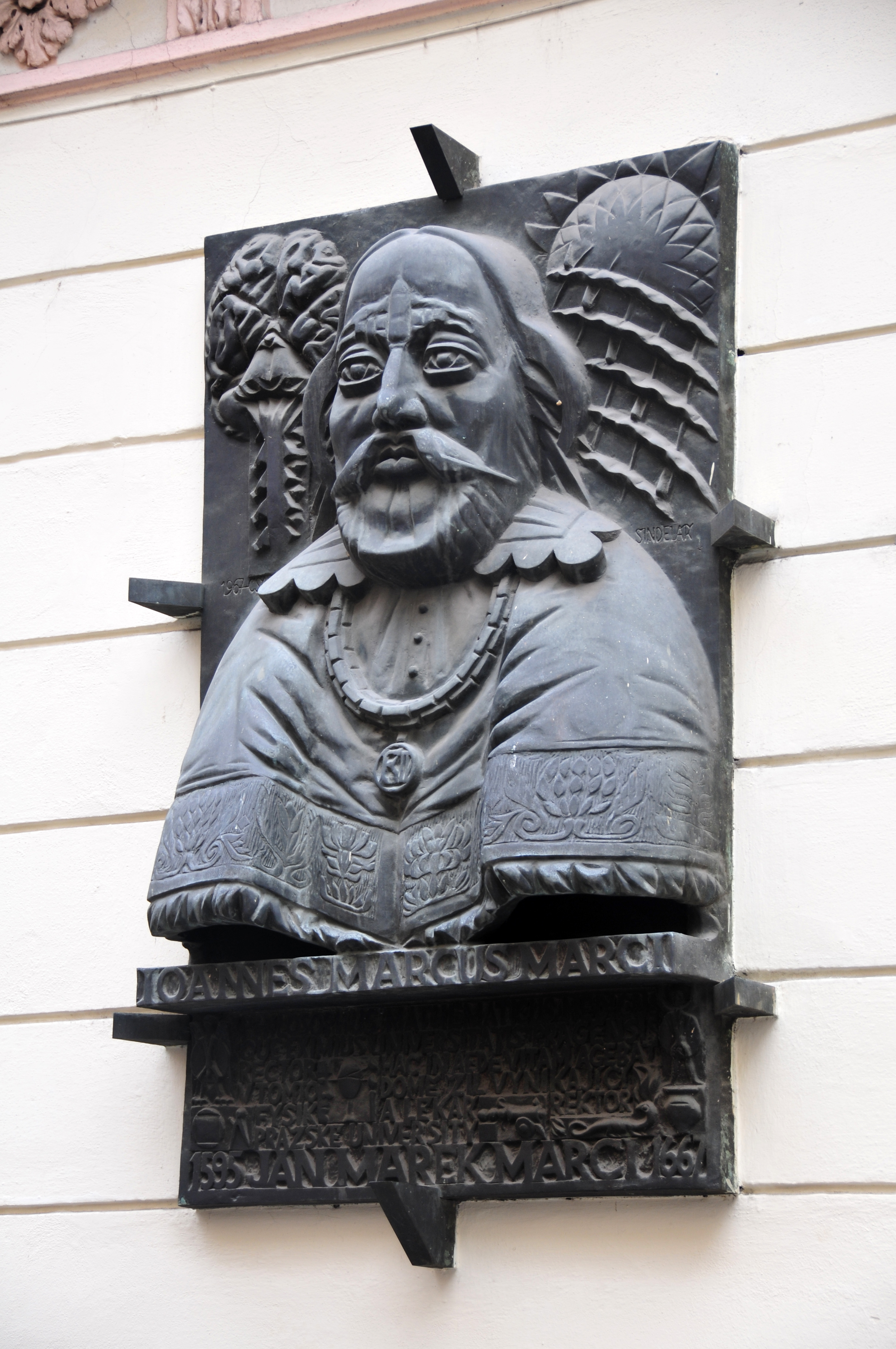 Prag